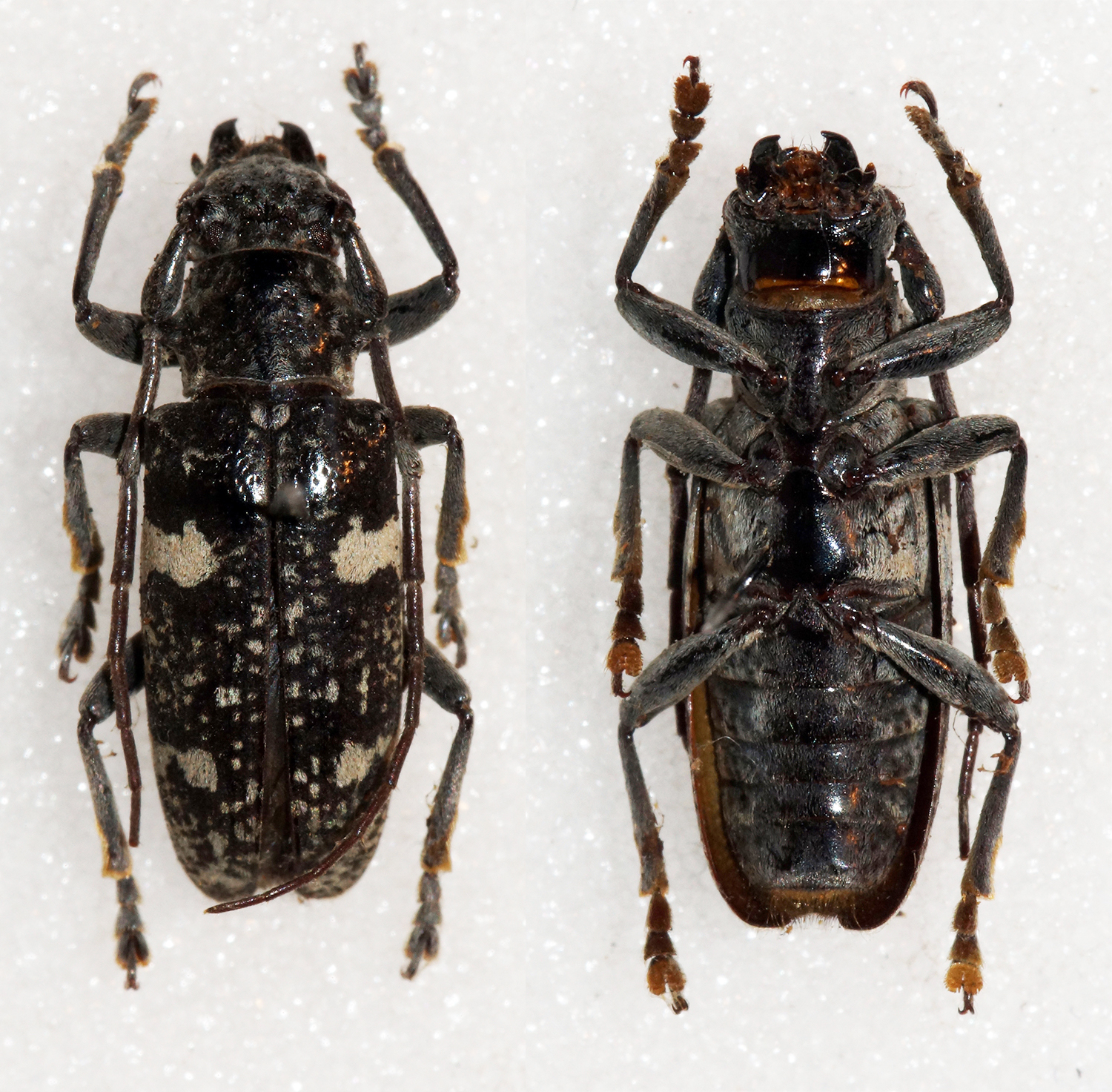 Breuning,1947 Sex: ? Data: 06-2014 - Mt Kalatungan - Bukidnon - Philippines Size: 11.5mm